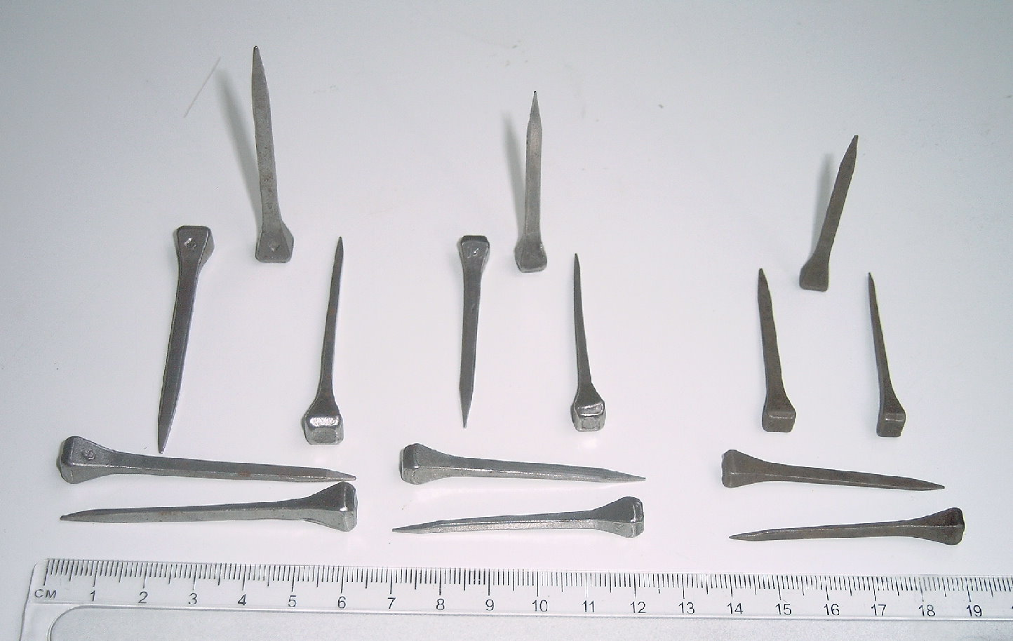 Drei verschiedene Hufnagelgrössen